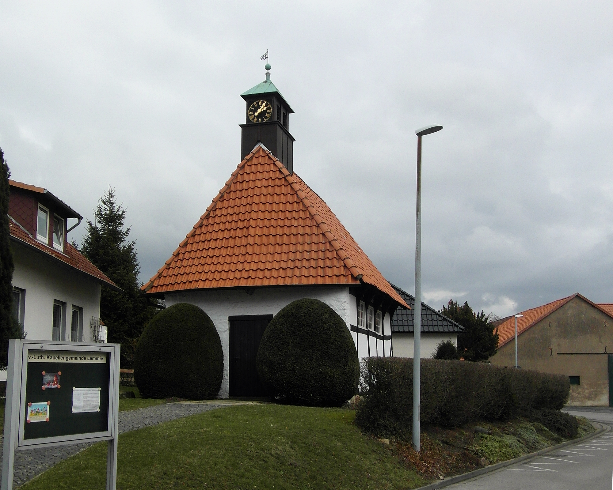 Frontseite der Lemmier Kapelle